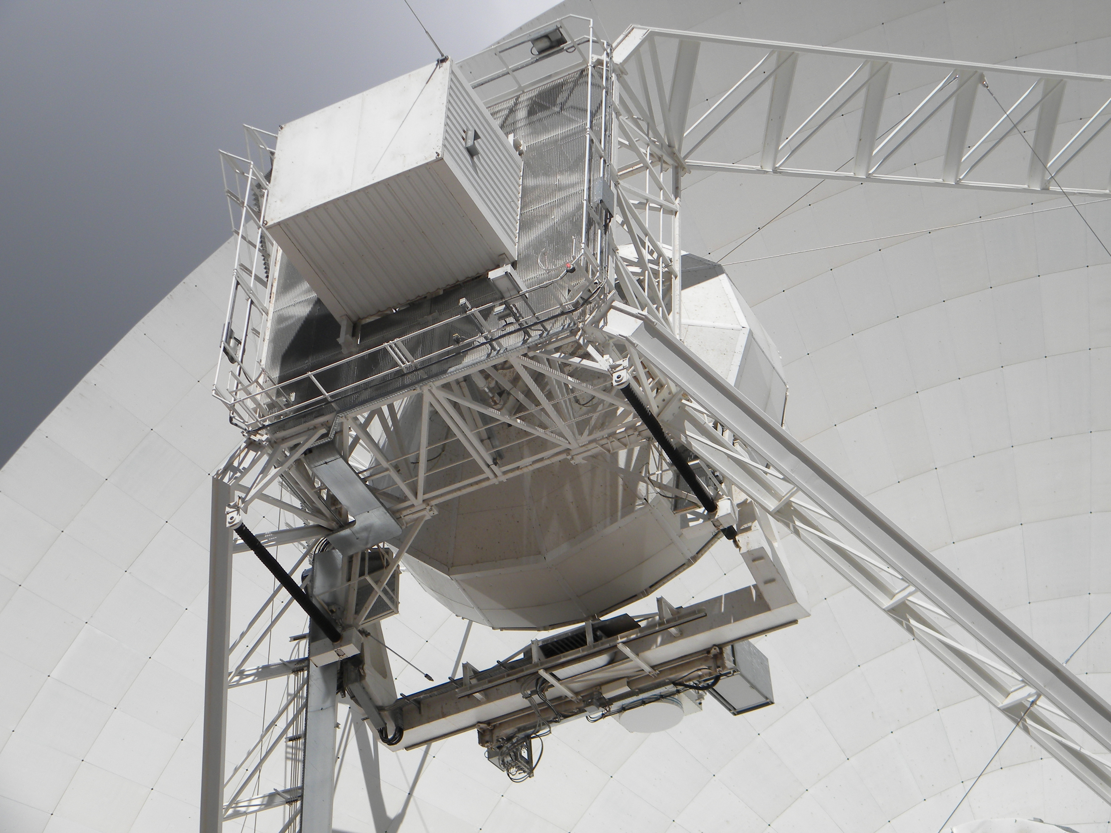 Particolare dello specchio secondario del radiotelescopio della Sardegna SRT